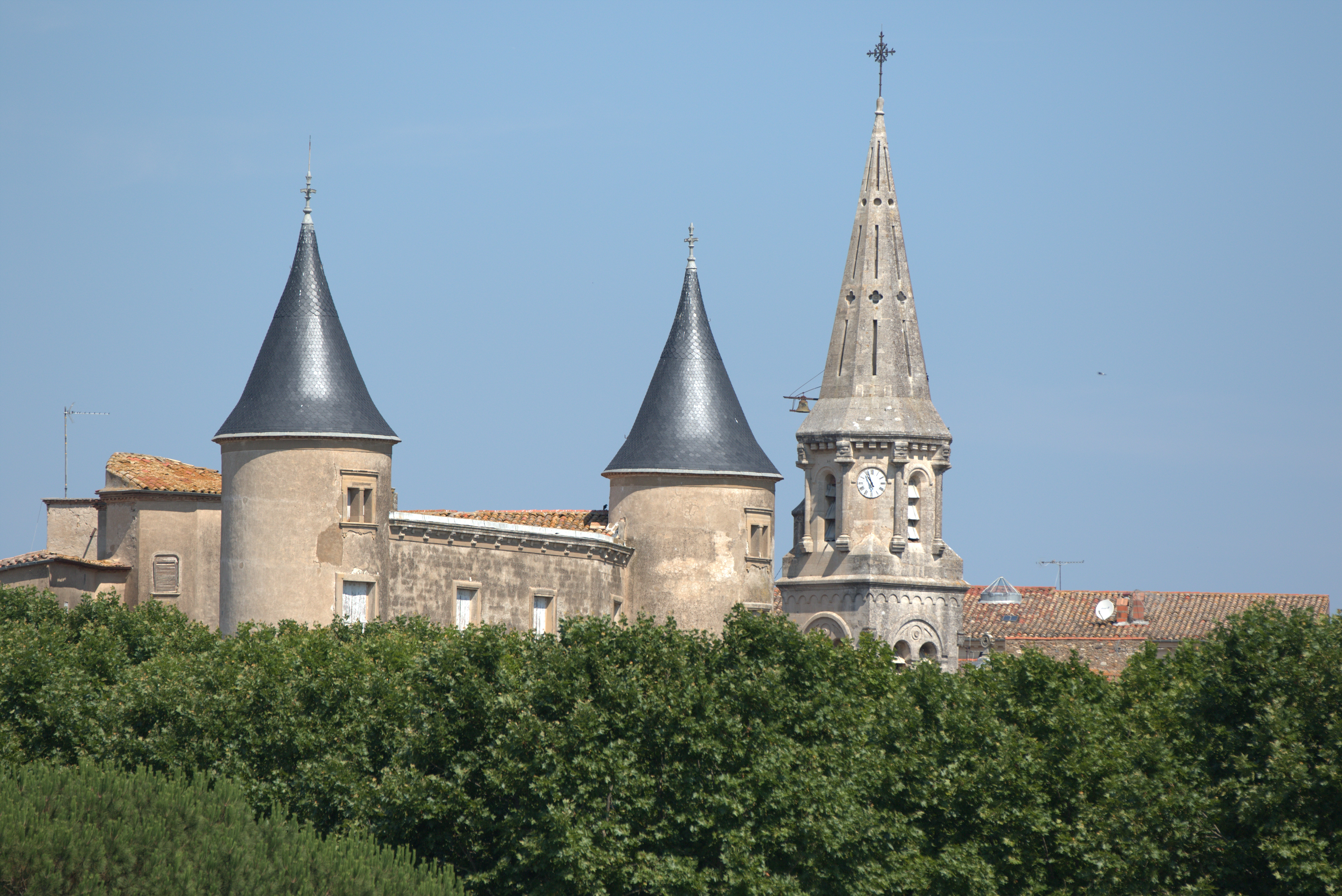 Château et clocher à Pouzolles.